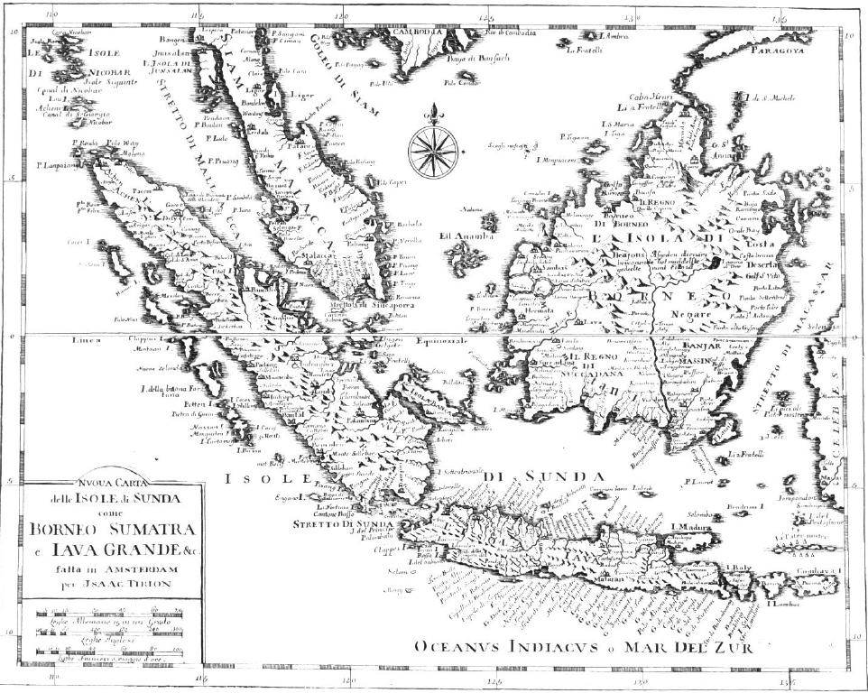 Riproduzione da Atlante delle Indie Orientali nel XVIII secolo.